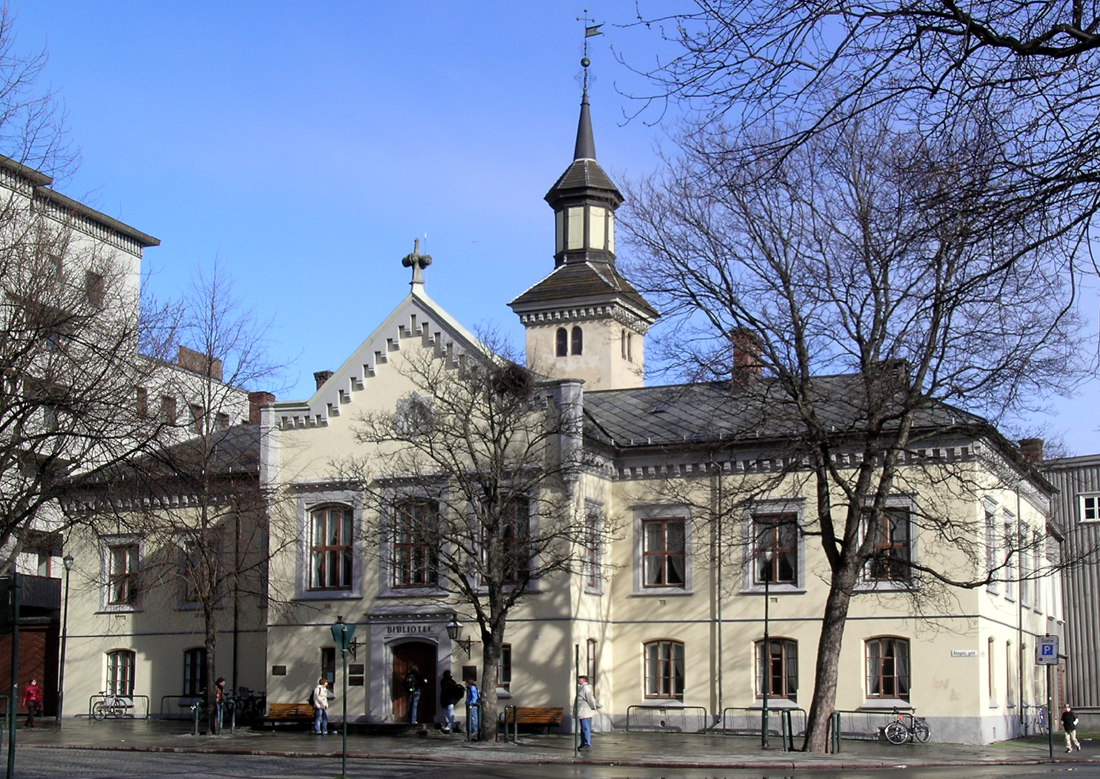 Trondheim bibliotek - tidligere rådhus - Kongens gate 2. Bygd 1706; arkitekt Johan Christopher Hempel. Ombygd 1870; arkitekt O.F.Ebbell. Fredet.